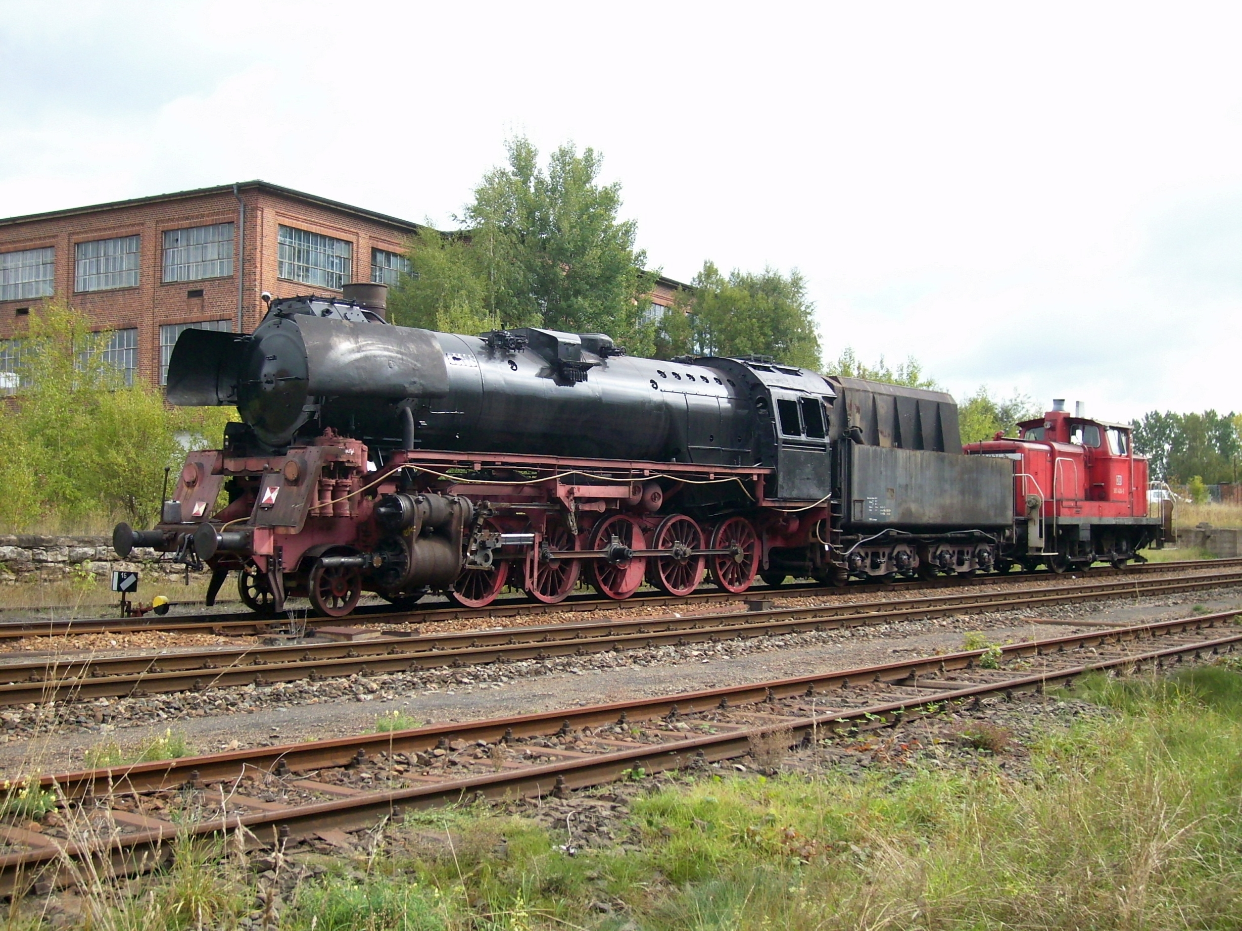 Lok 50 4073 in Immelborn